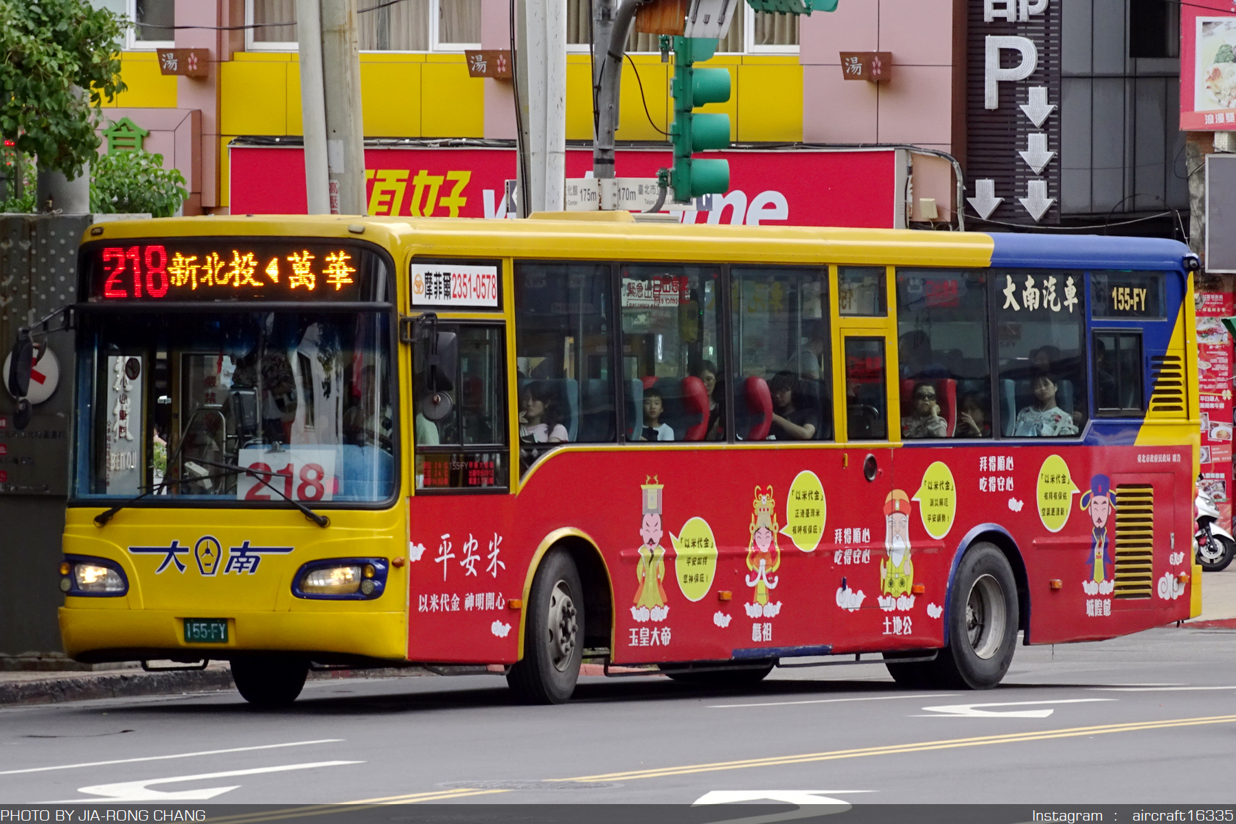 HINO - RK8JRSA - 155-FY